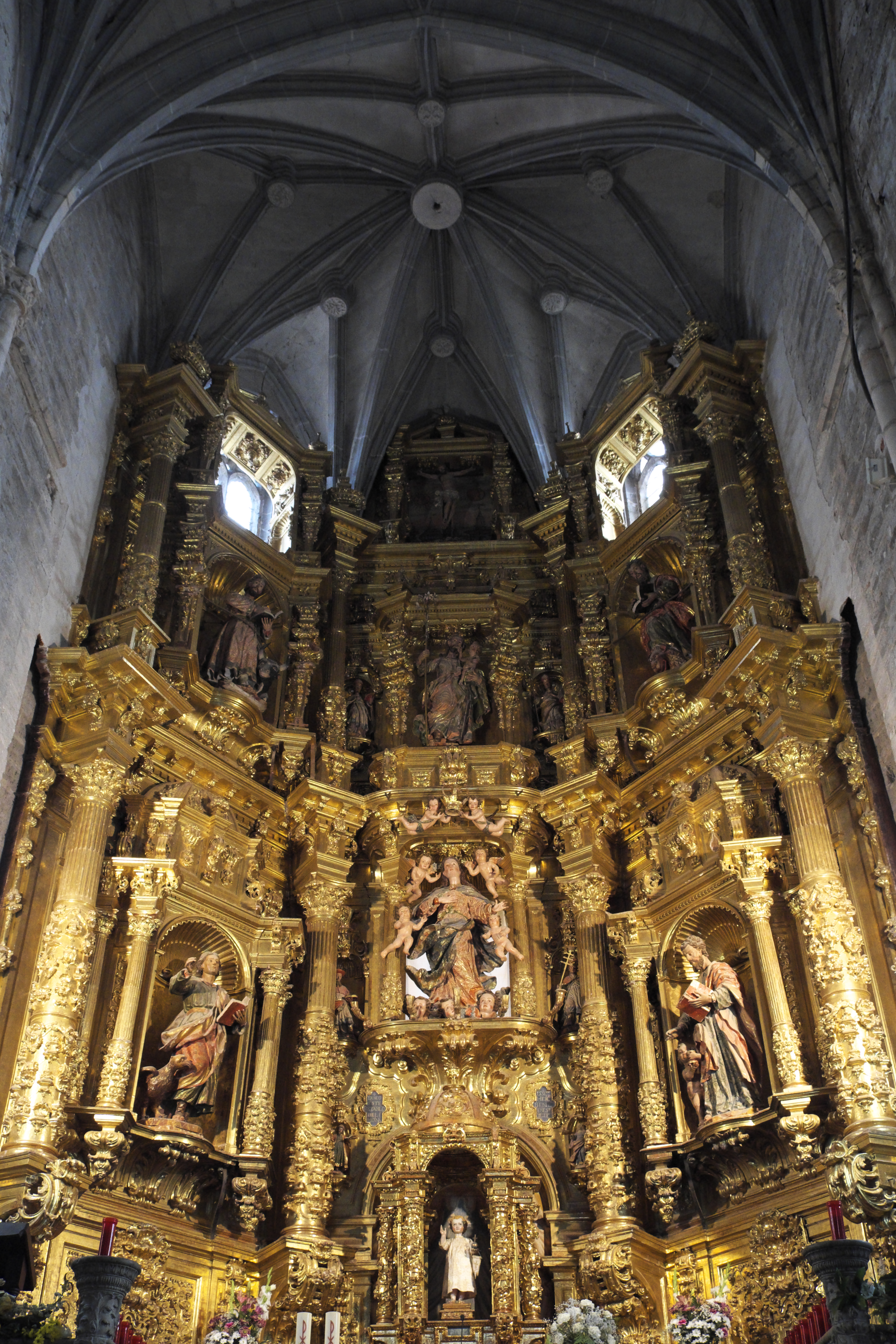 Kirche Asunción de Nuestra Señora (Mariä Himmelfahrt) in Santa María del Campo in der Provinz Burgos (Kastilien-León/Spanien), Hauptaltar von José Valdán und Joaquín de Villandiego aus dem 18. Jahrhundert